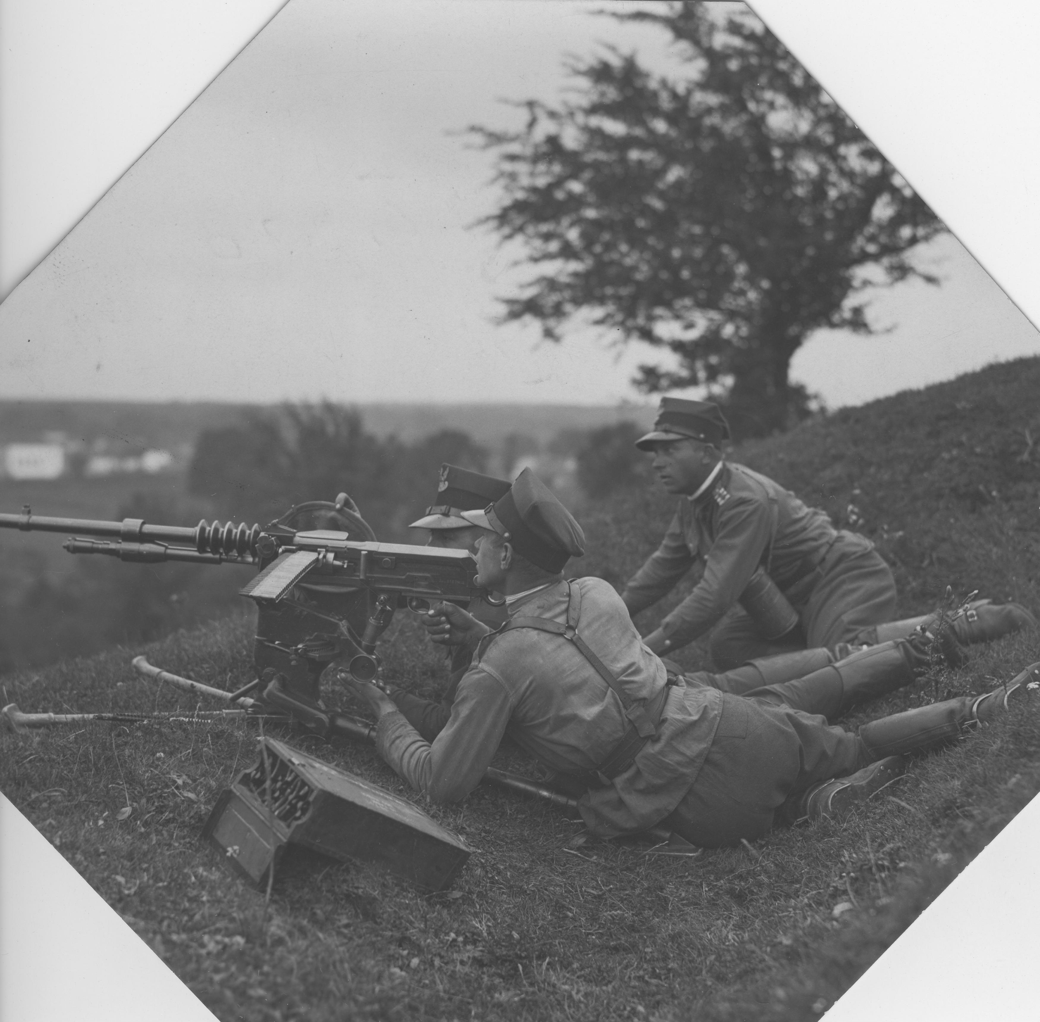 Artylerzyści z ckm Hotchkiss wz.25 prowadzą ogień używając taśmy sztywnej. Amunicyjny łapie łuski w wiadro kawaleryjskie.